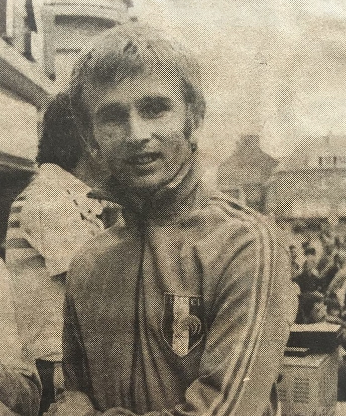 jean claude decosse